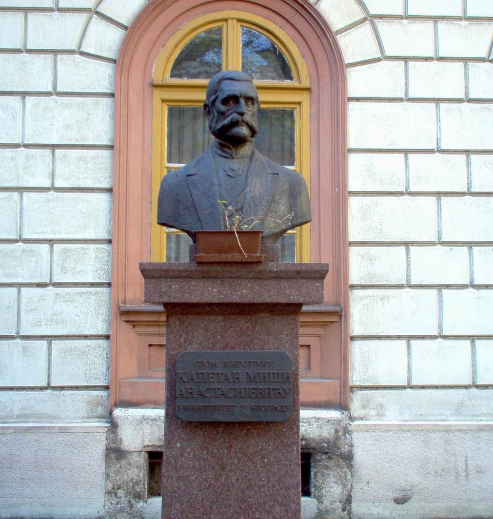 Капетан Миша Анастасијевић, споменик у дворишту његовог здања.